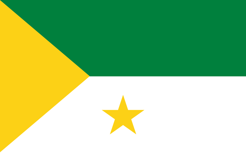 Bandera de Rocafuerte